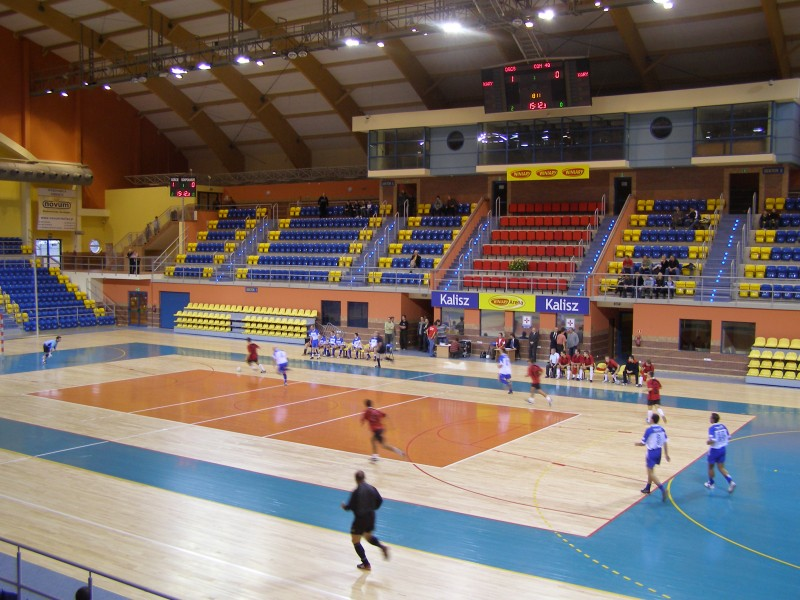 Hala Sportowo-Widowiskowa na Dobrzecu zdjęcie: 05/11/2006r